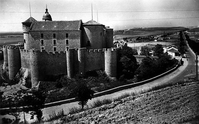 Castillo. Archivo Histórico General - Simancas (Valladolid) - Impresión: Ediciones Arribas - Zaragoza. Vista general del Archivo de Simancas desde una loma. - Tarjeta postal. Papel 141 x 89 B/N